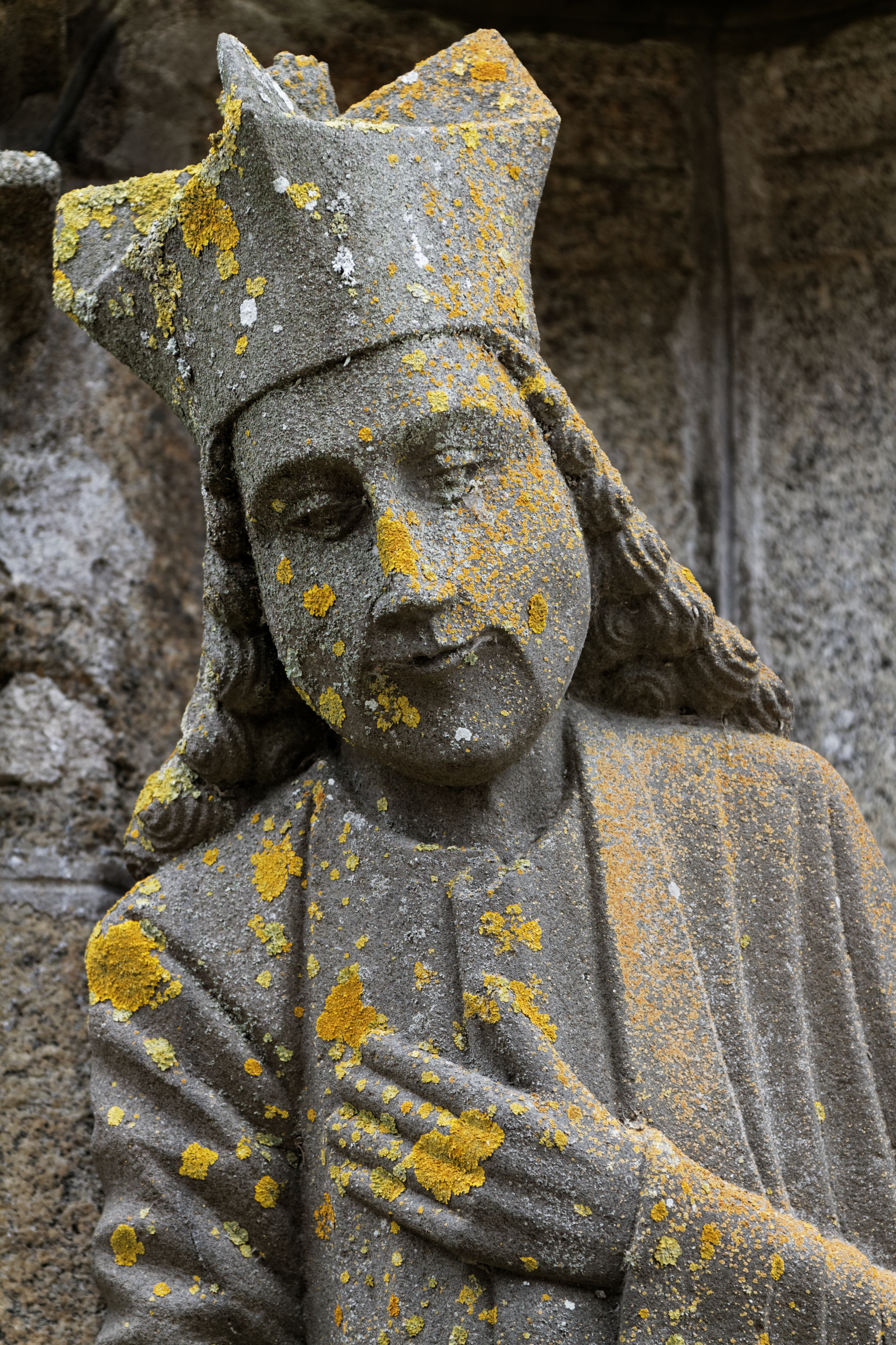 L'enclos paroissial de Saint Thegonnec dans le Finistère.